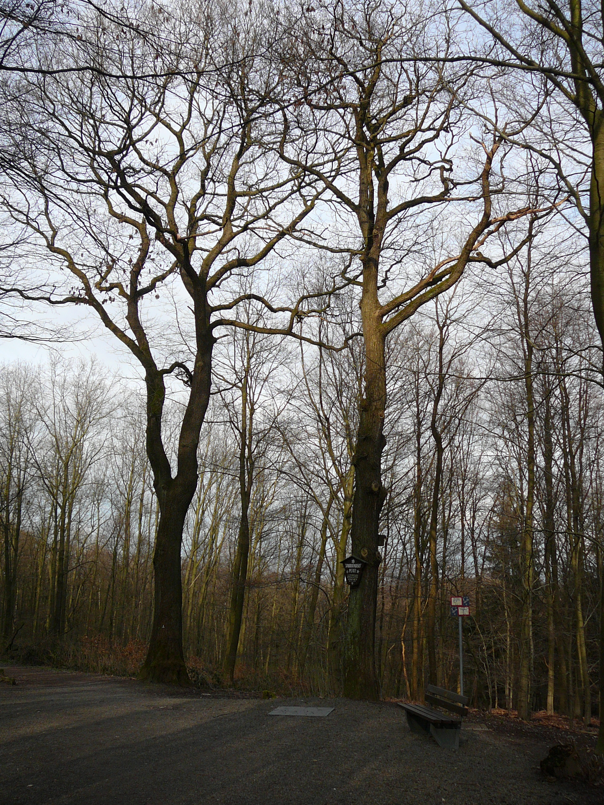 Barmer Wald, Wuppertal